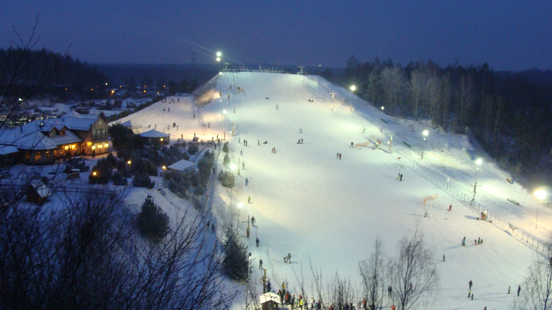 Dolomity Sportowa Dolina w zimie